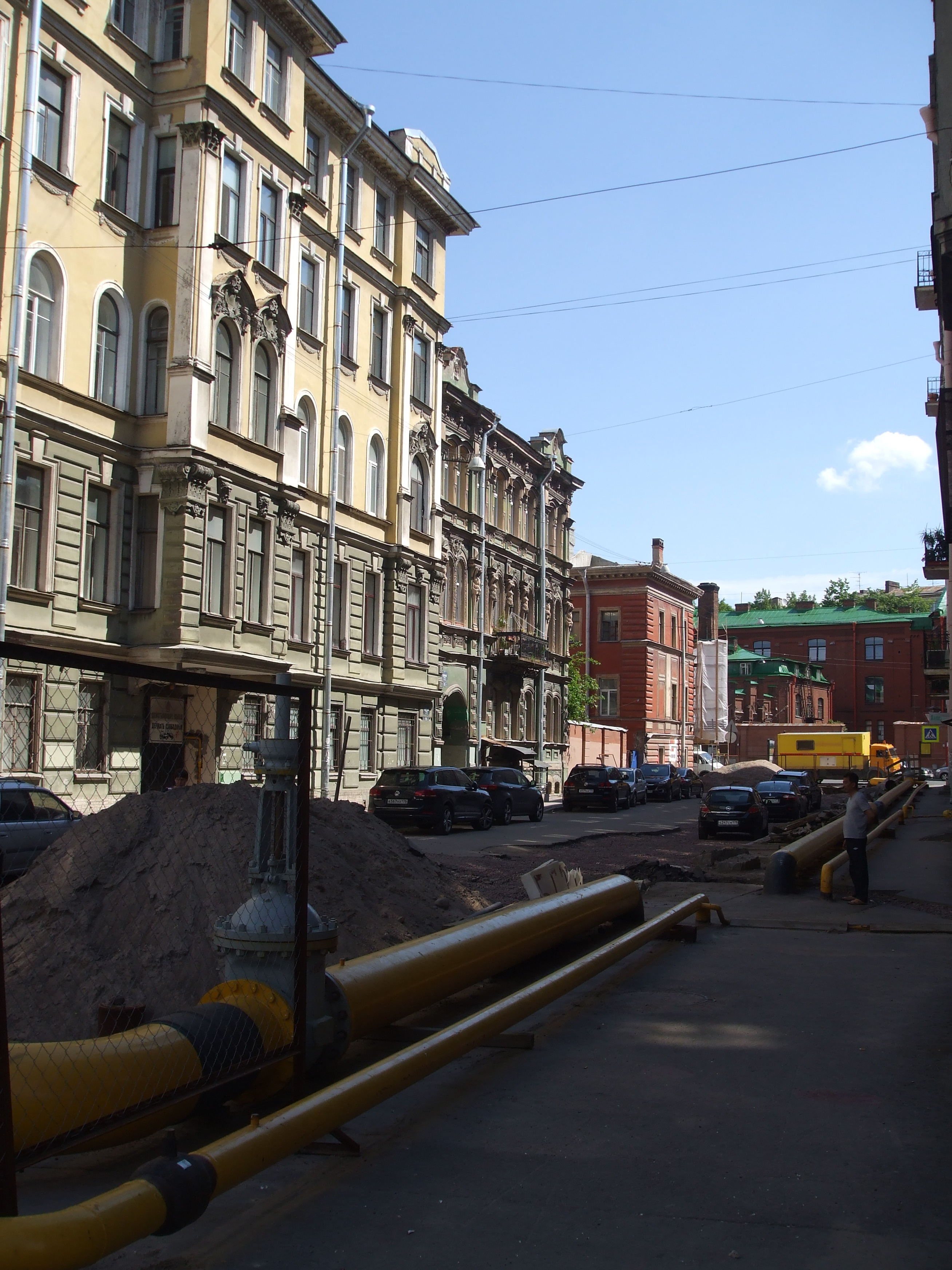 Вид от улицы Радищева в сторону Лиговского проспекта